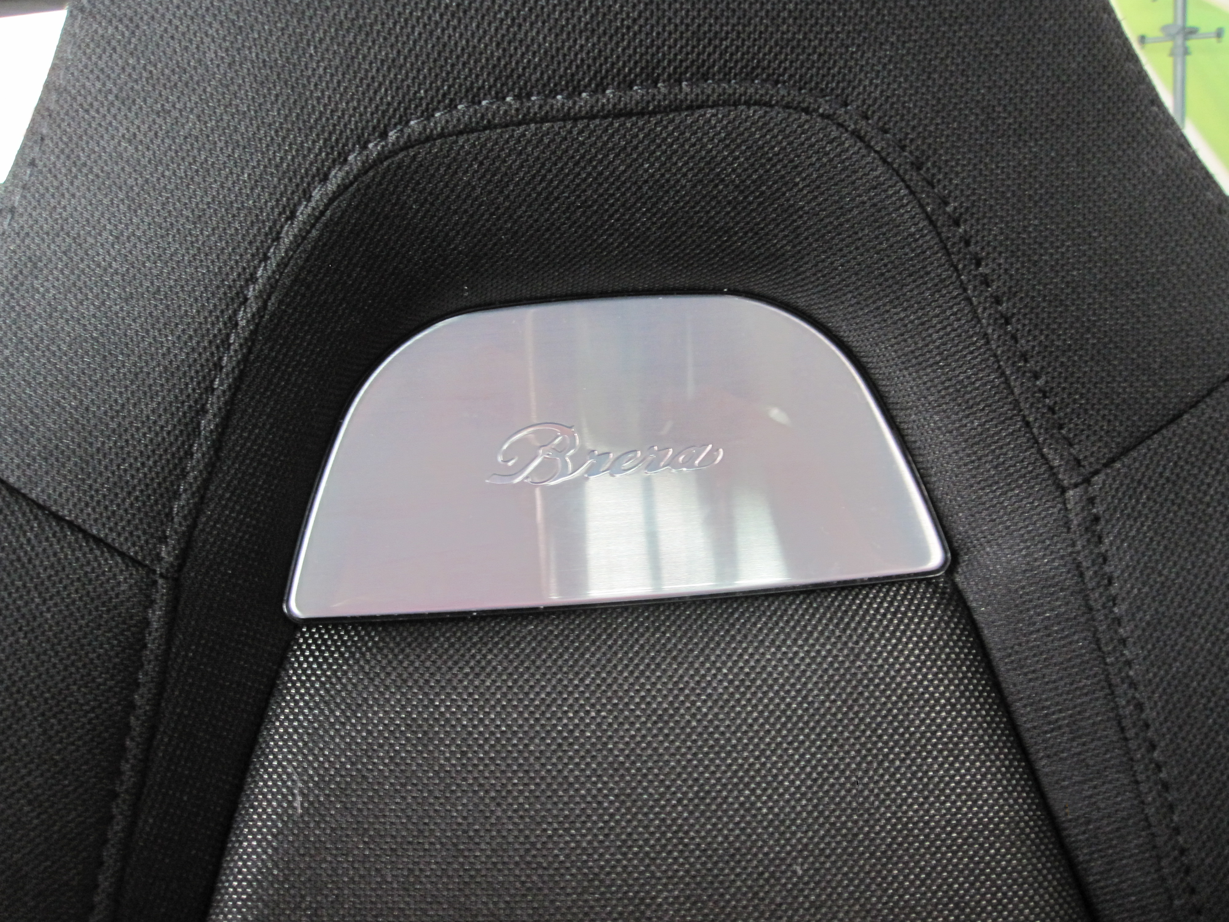 targa in alluminio Alfa Romeo Brera nel poggiatesta